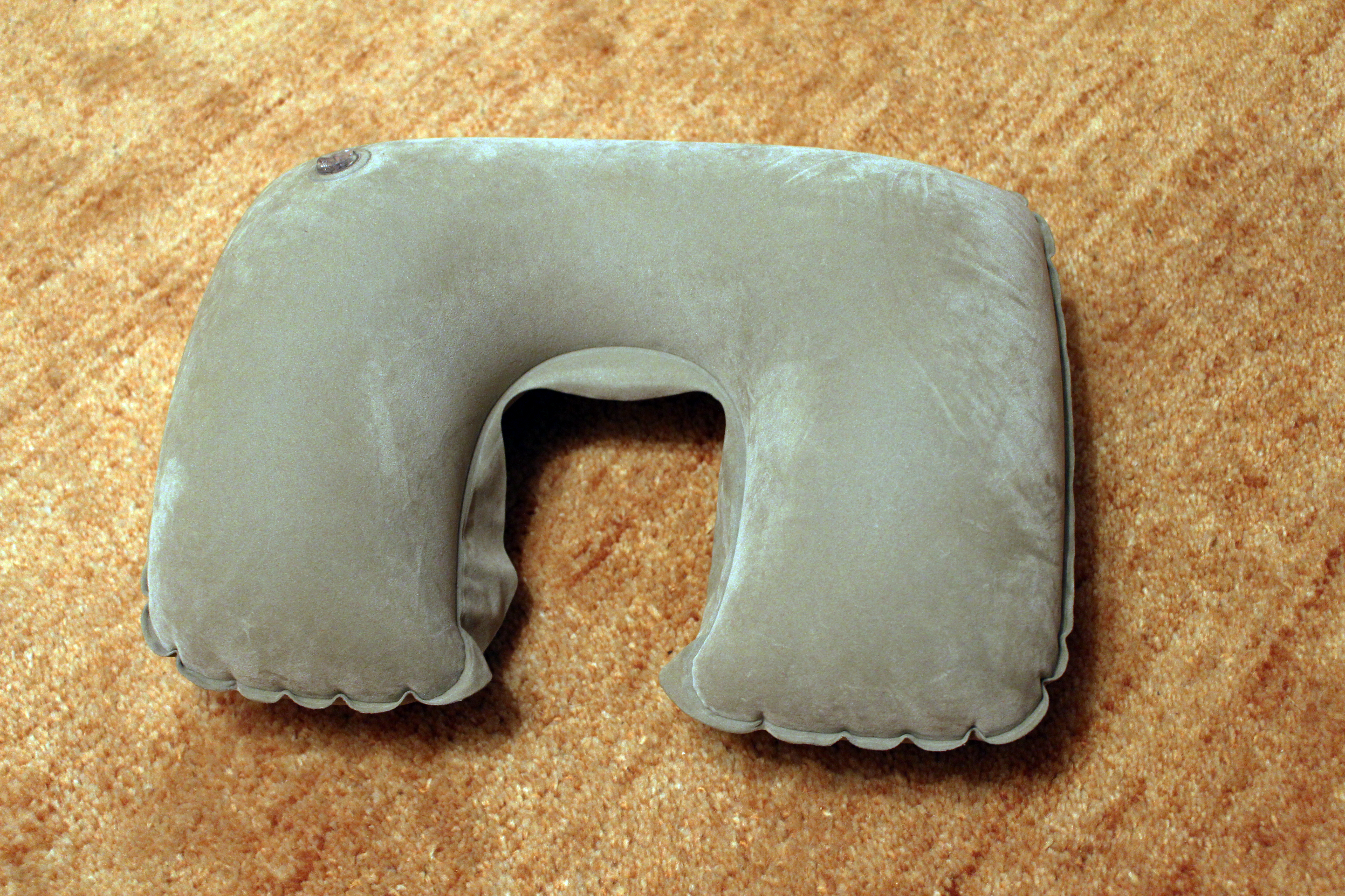 Luftgefülltes Nackenhörnchen